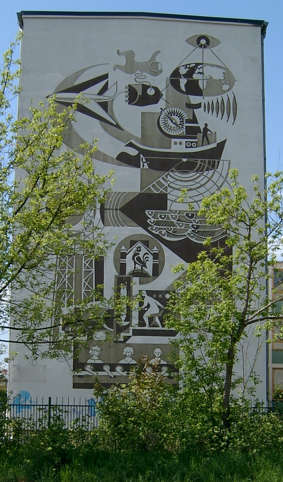 Wandgemälde Halbleiterlemente in Frankfurt (Oder). Geschaffen von Rudolf Grunemann.